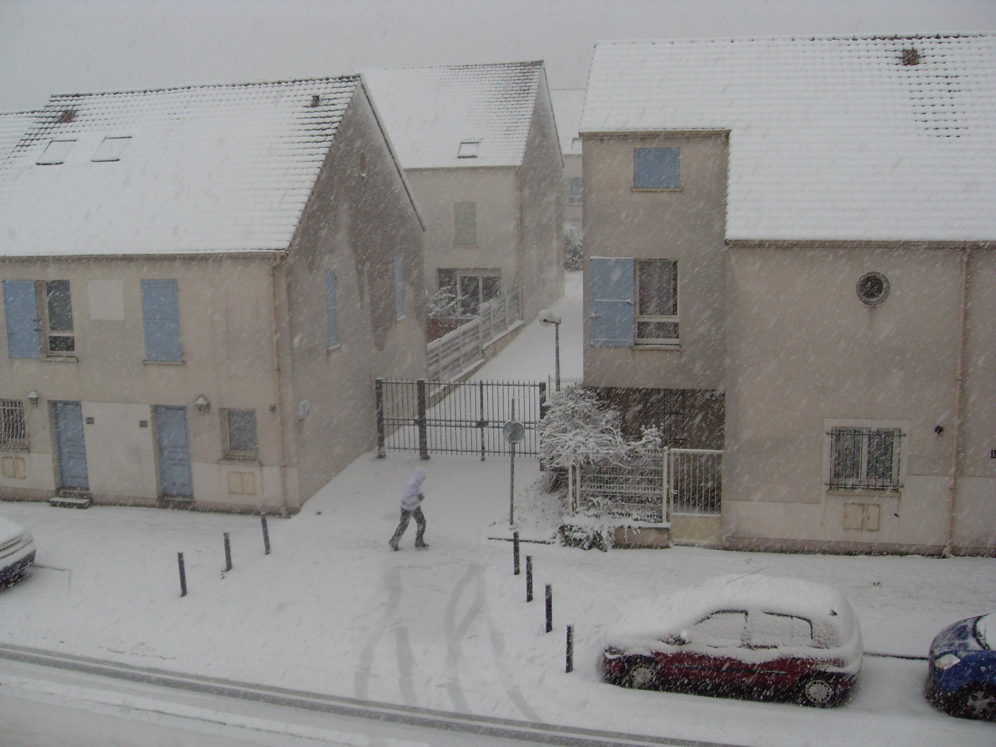 Les importantes chutes de neige du à Montreuil, quartier de la Boissière.